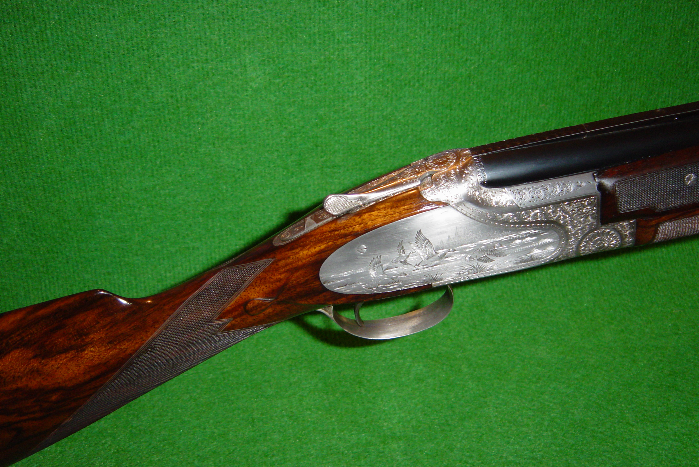 Fusil; superposé BROWNING B25 Calibre 12